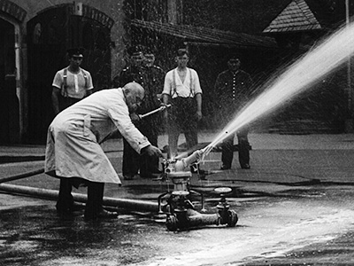 Brandschutzpionier Johannes Schänker